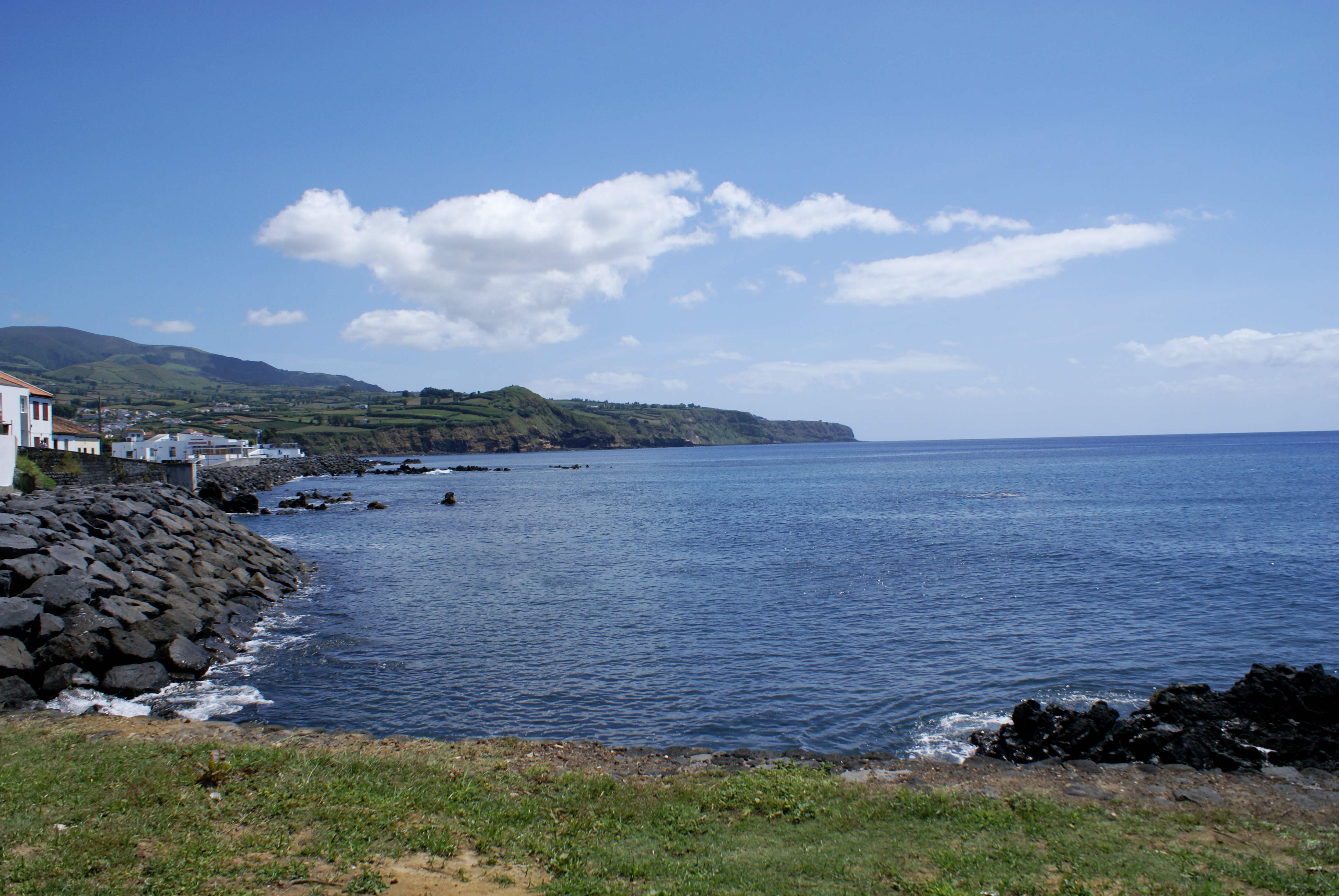 Miradouro do Castelo, Lagoa, ilha de São Miguel, Açores